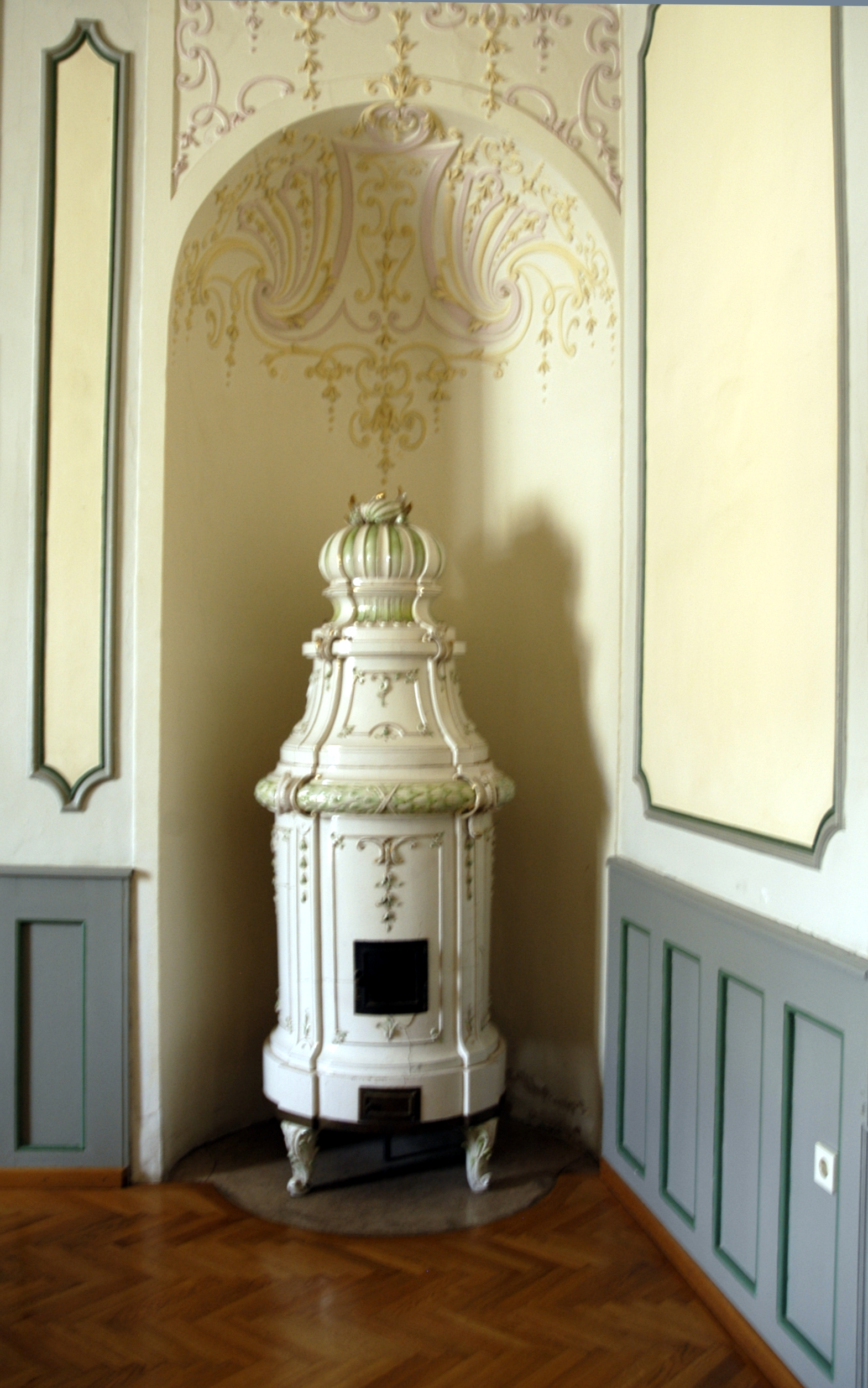 ehemaliges Schloss Sonnberg, Justizanstalt, Barock-Kachelofen